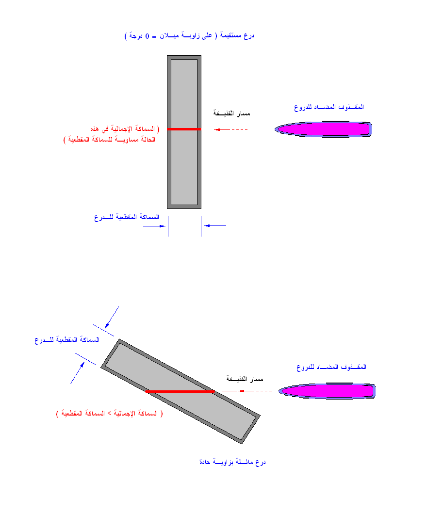 رسم توضيحي للمقارنة ما بين الدروع المستقيمة والمائلة.